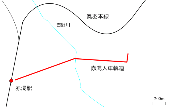 Route map of Akayu Jinsha Tramway（赤湯人車軌道）.